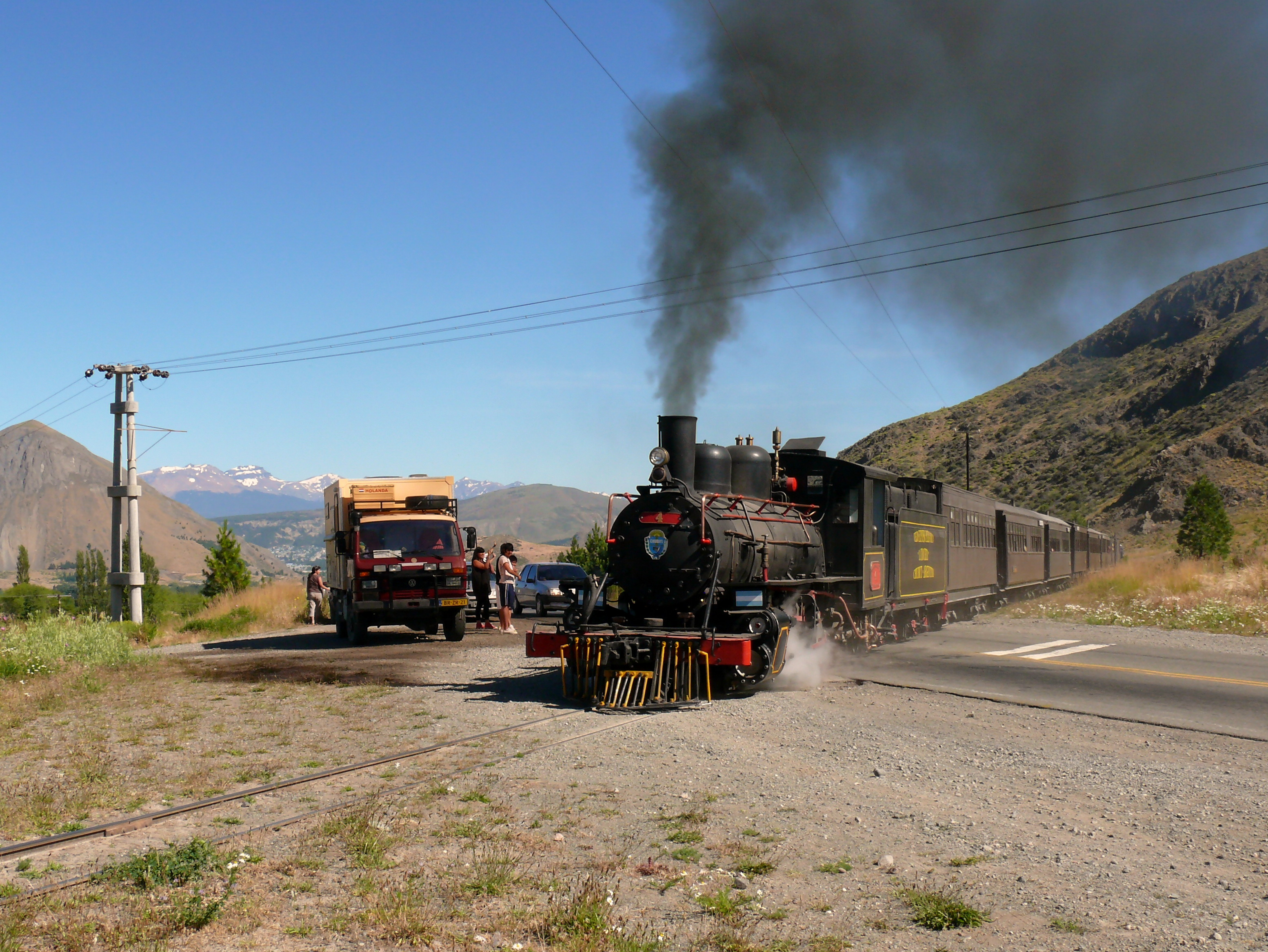 La Trochita cruzando Ruta Nacional 259